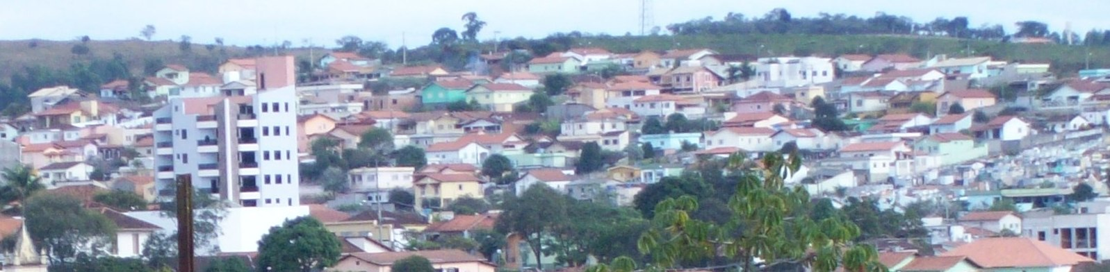 Bairro na cidade de Oliveira MG.